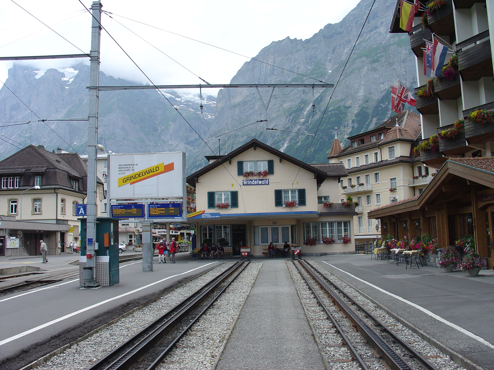 Wengernalpbahn and Berner Oberland-Bahnen Grindelwald Station